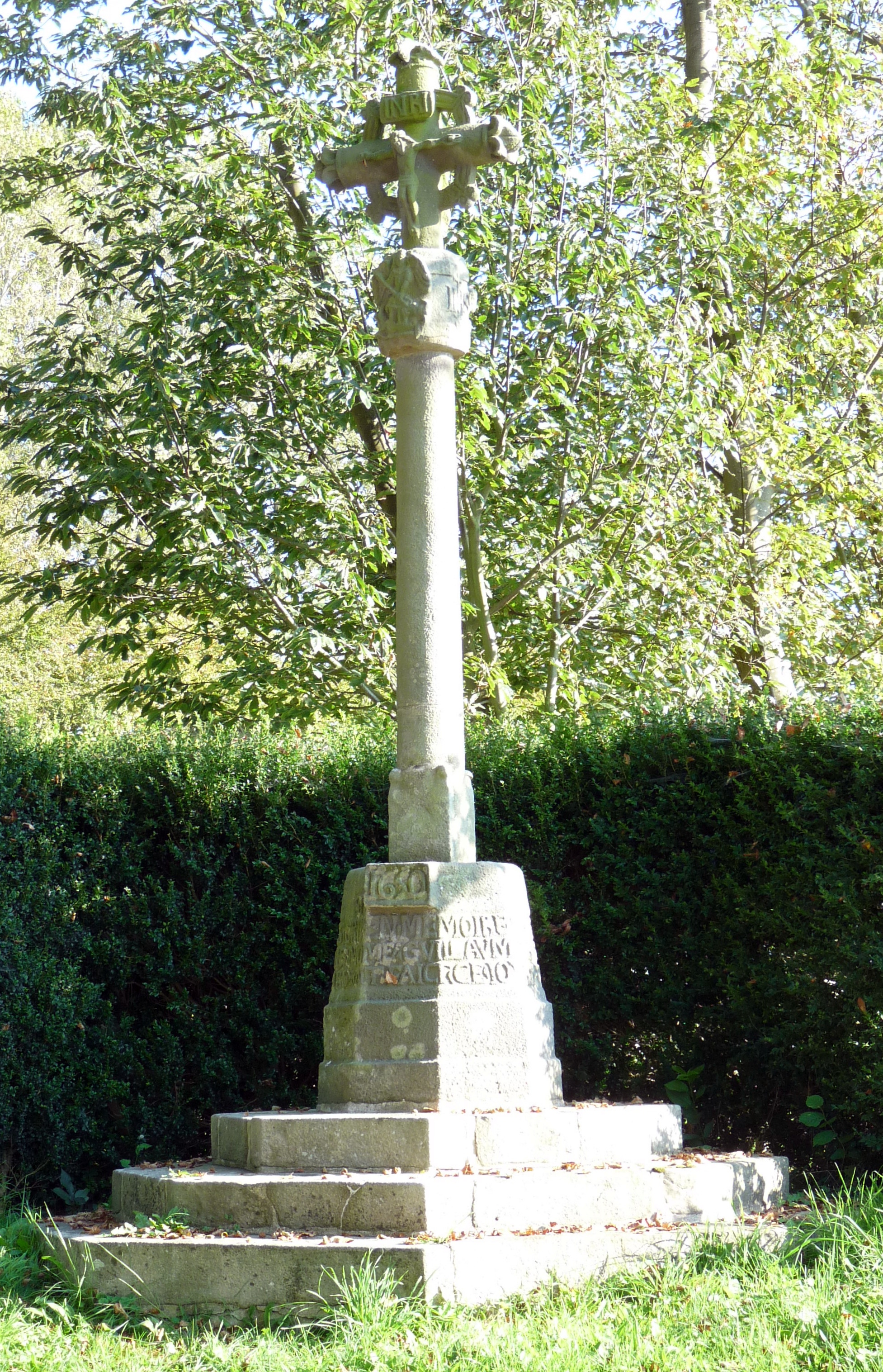 Calvaire de Malleville-les-Grès (Inscrit) .